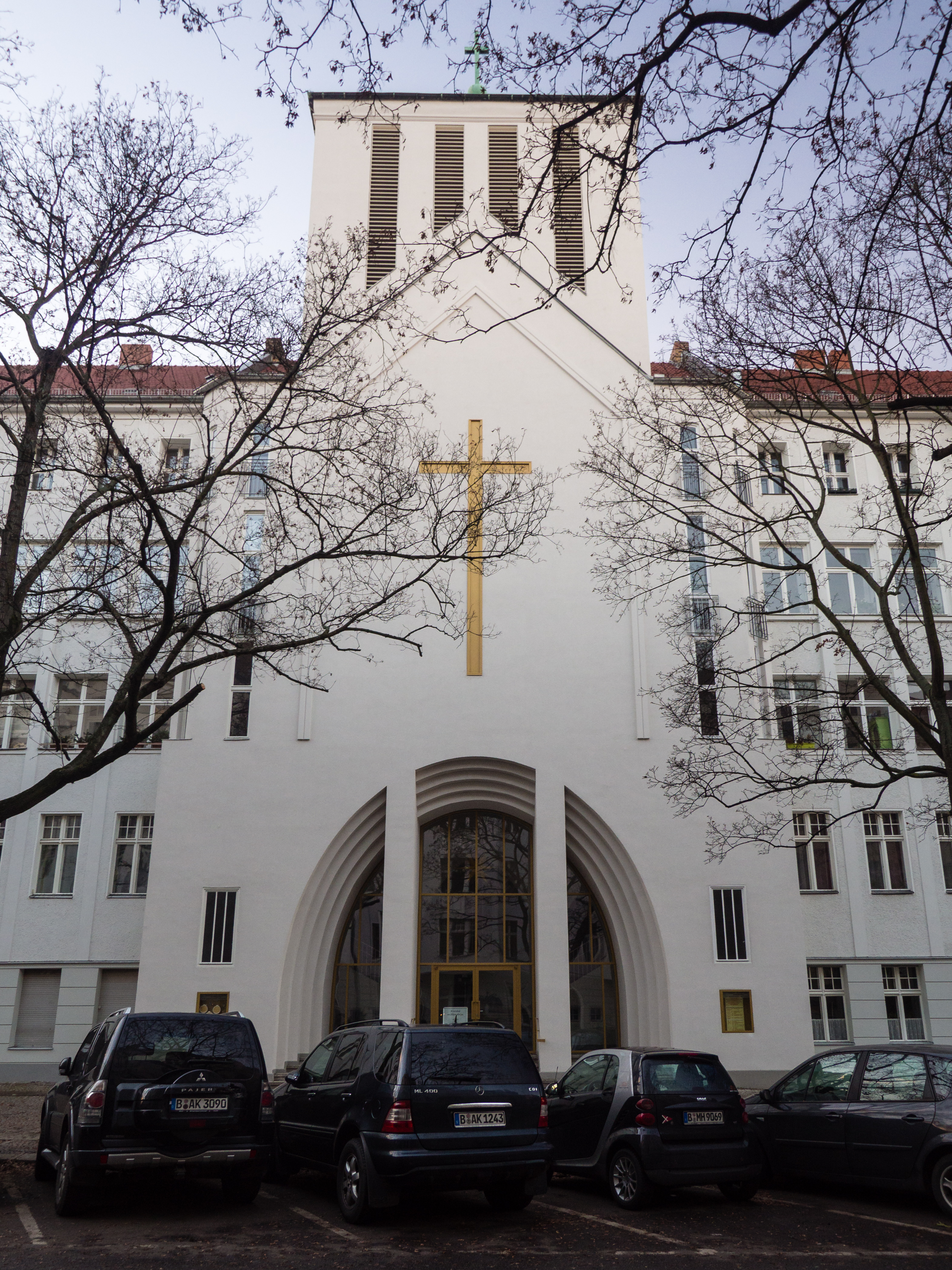 Kirche zum Heiligen Kreuz in Berlin-Wilmersdorf nach dem Umbau des Eingangsbereichs.